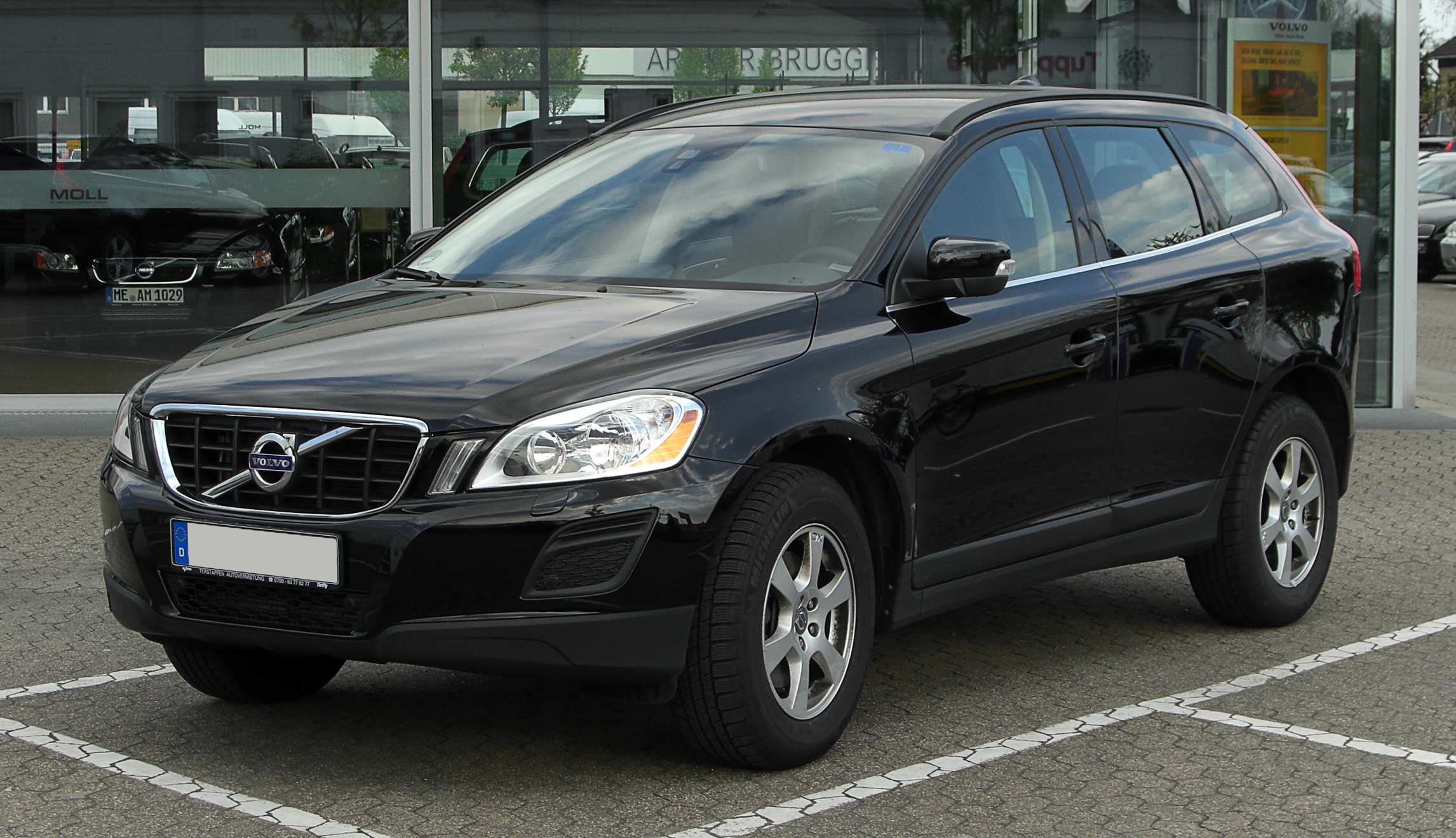 Volvo XC60 D3